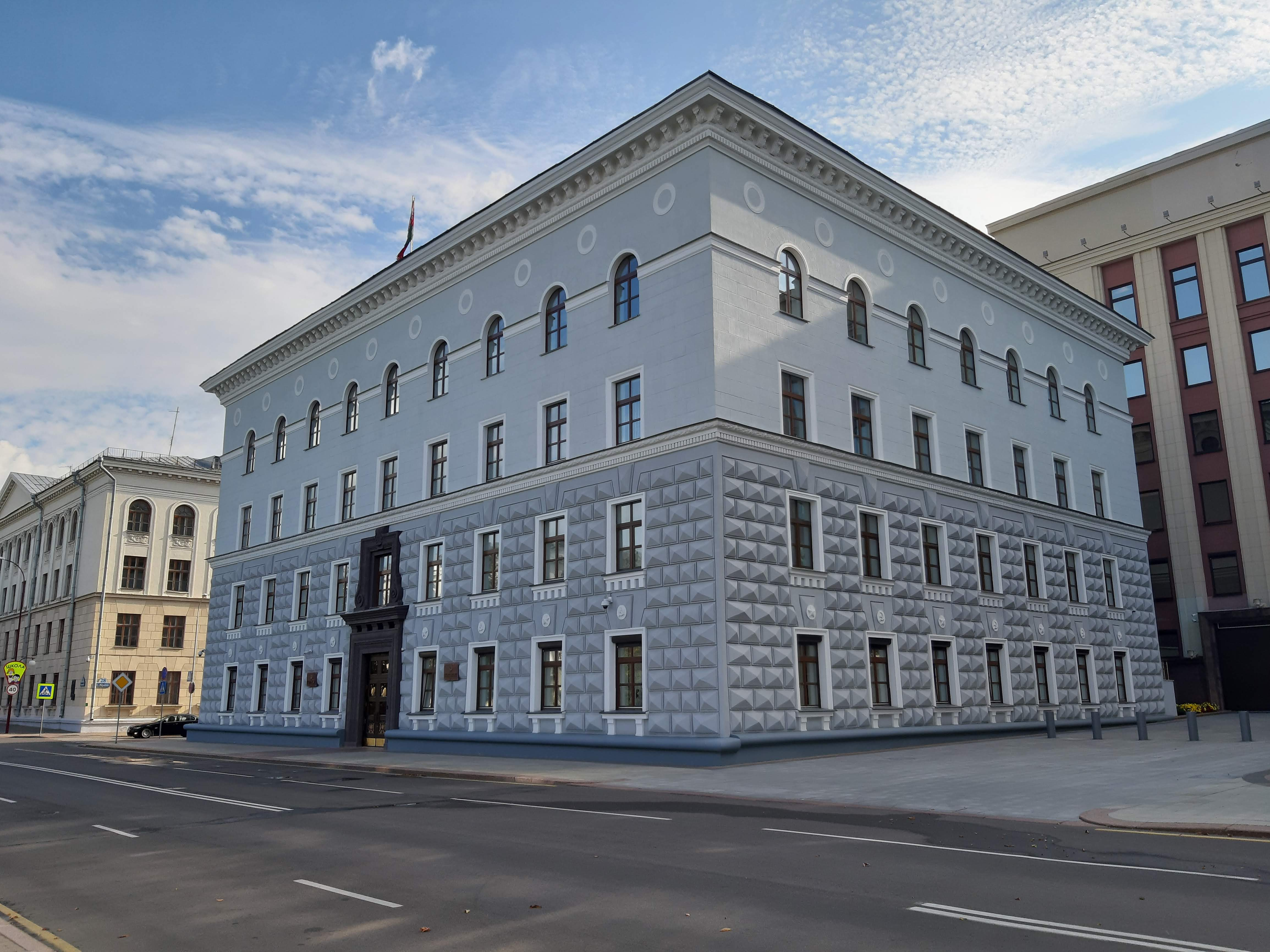 Мінск. Па Чырвонаармейскай